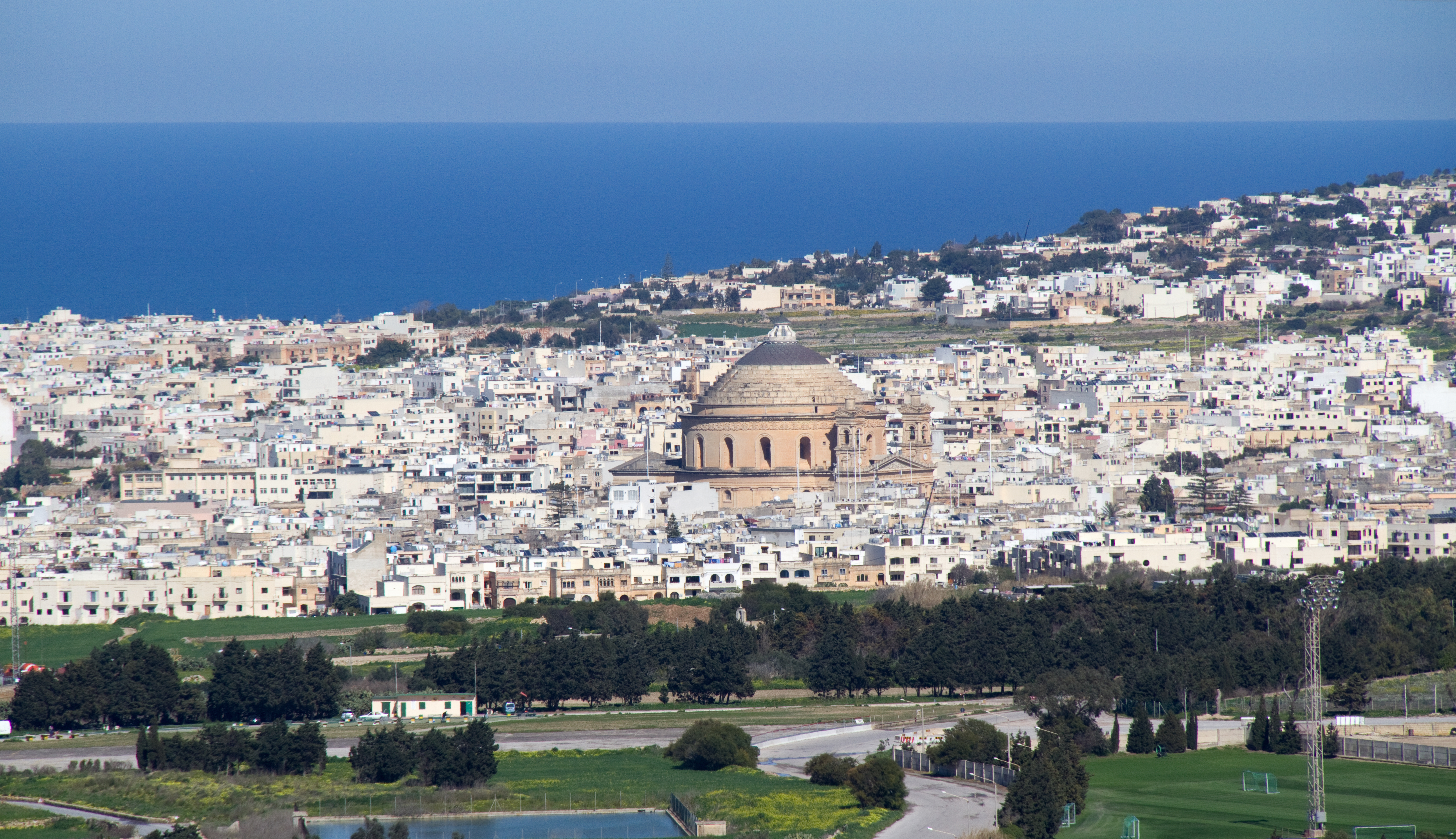 Mosta Dome 4